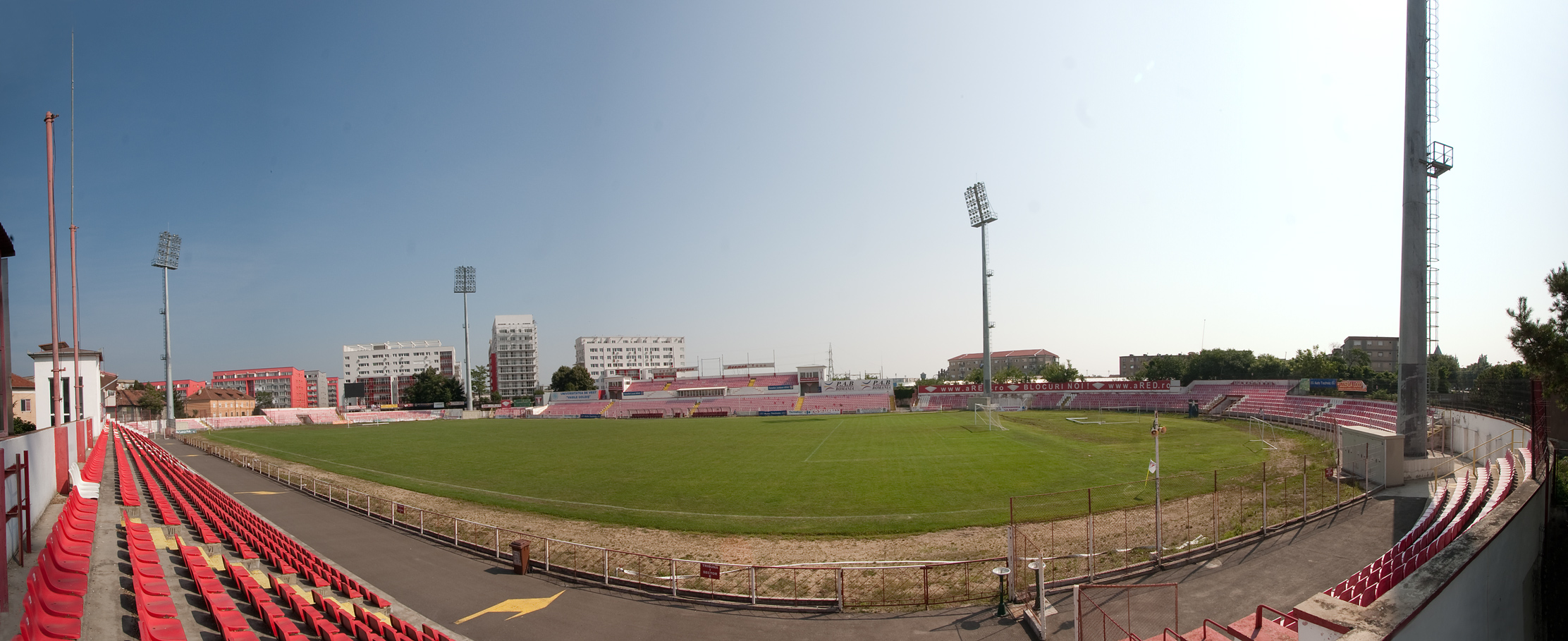 Stadionul Francisc von Neumann - Fußballstadion UTA in Arad, Rumänien